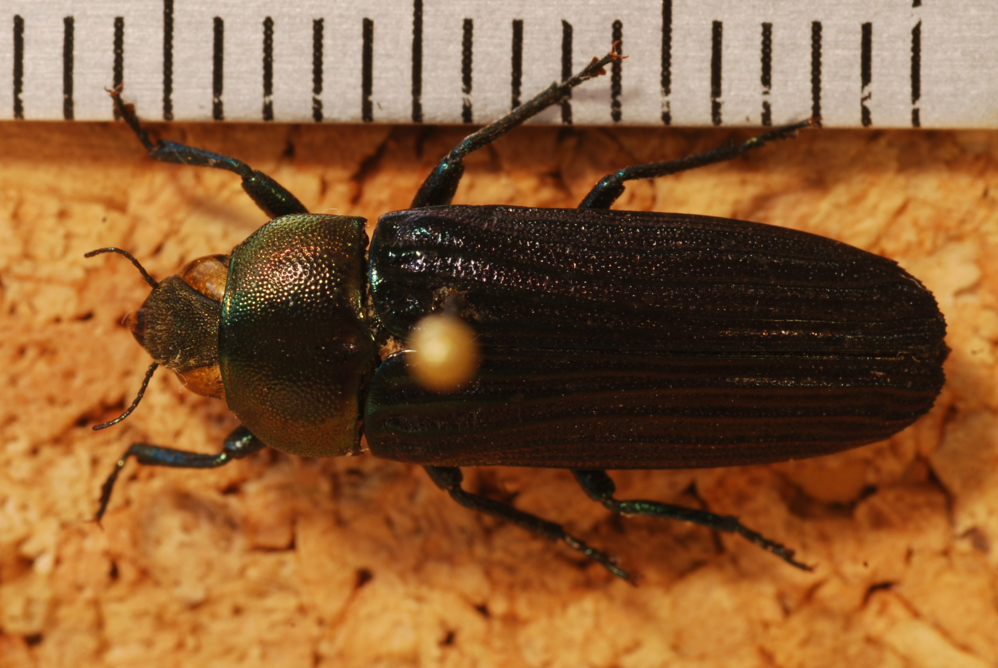 San Sai, Chiang Mai, THAILAND